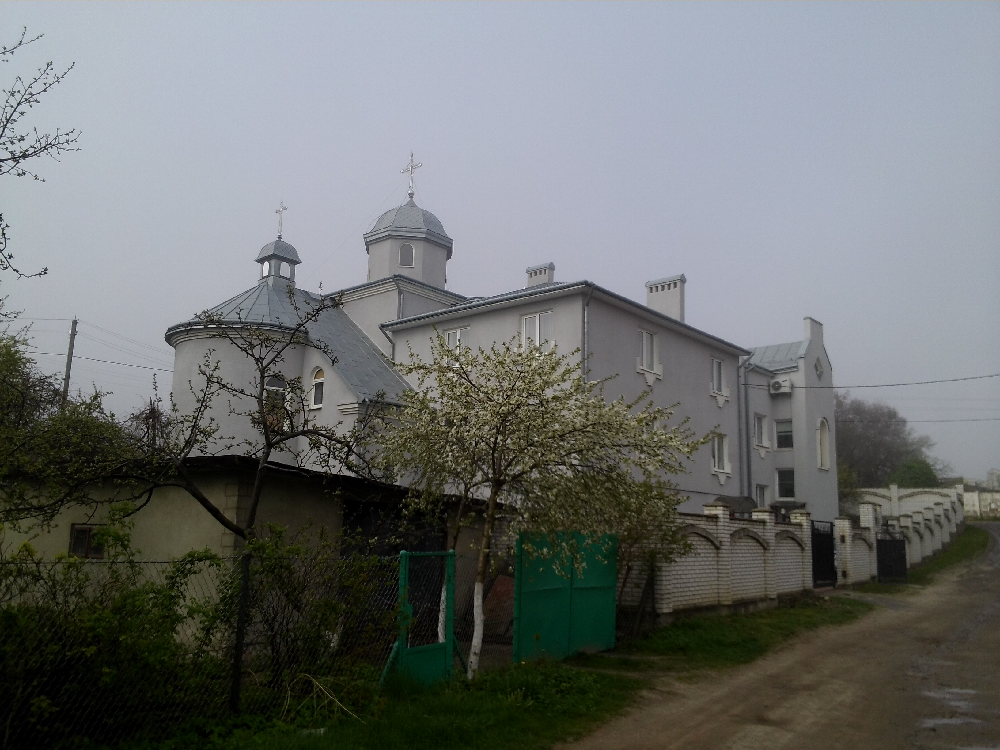 Монастир сестер Пресвятої Родини у Львові